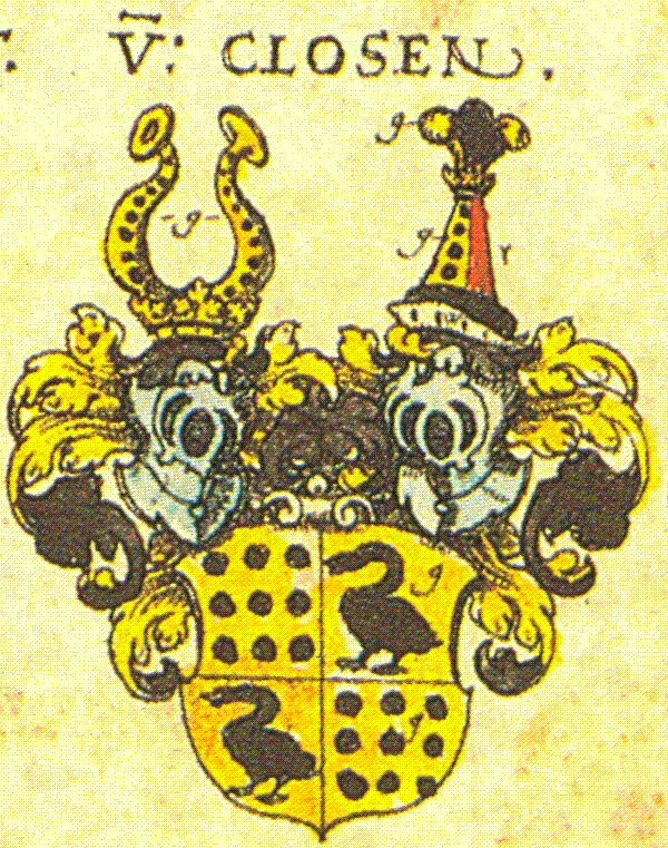 Wappen der Adelsfamilie Closen /Aus Siebmacher 1605:78,8